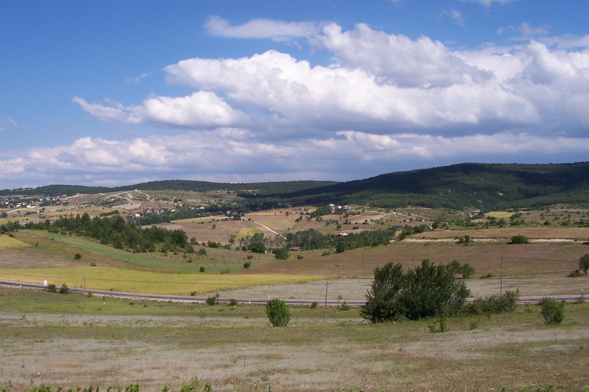 Eflani